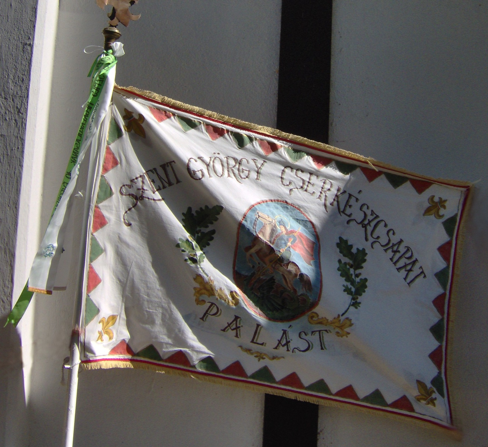 A palásti Szent György cserkészcsapat zászlaja